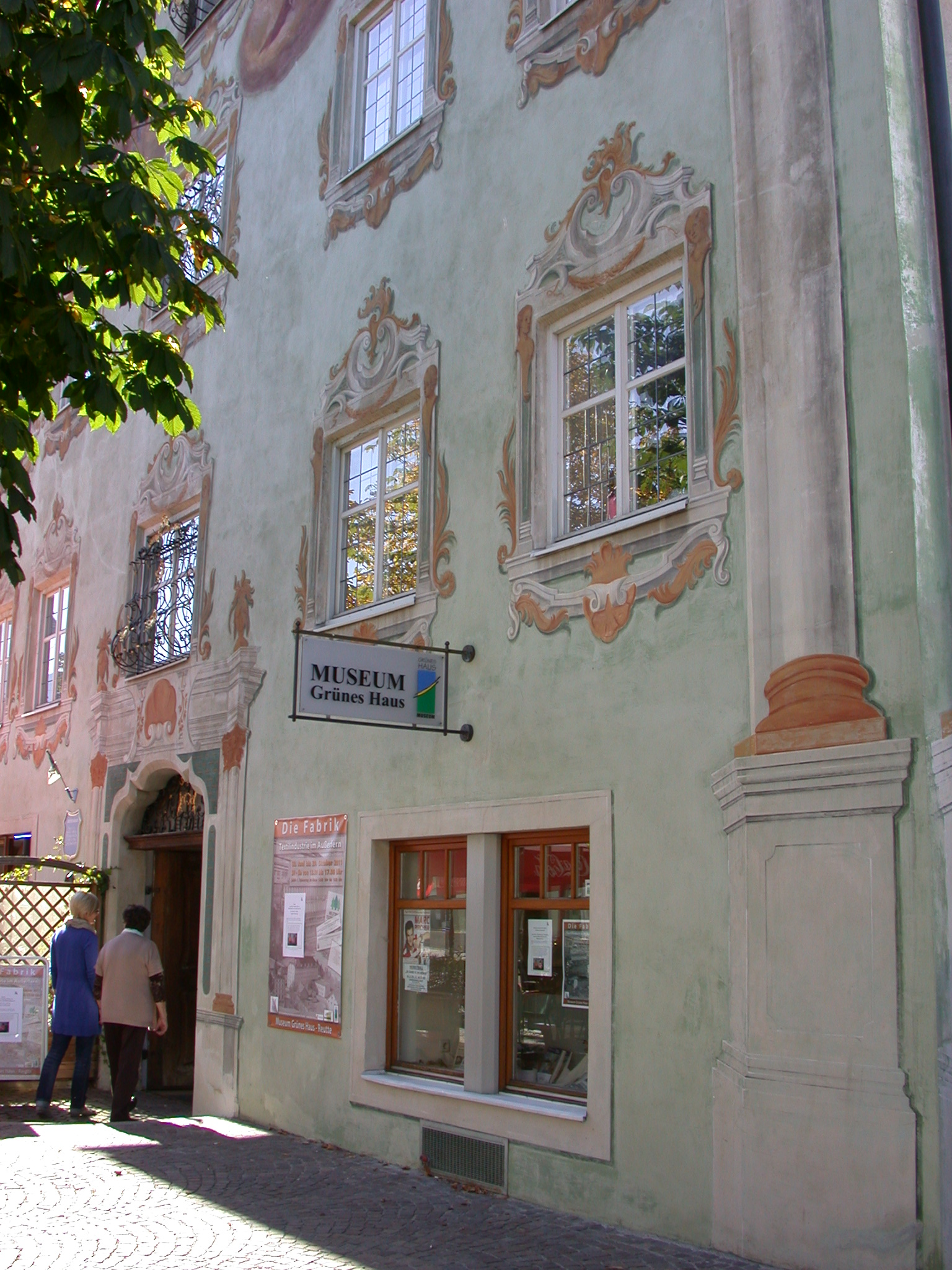 Bürgerhaus, Heimatmuseum, Grünes Haus